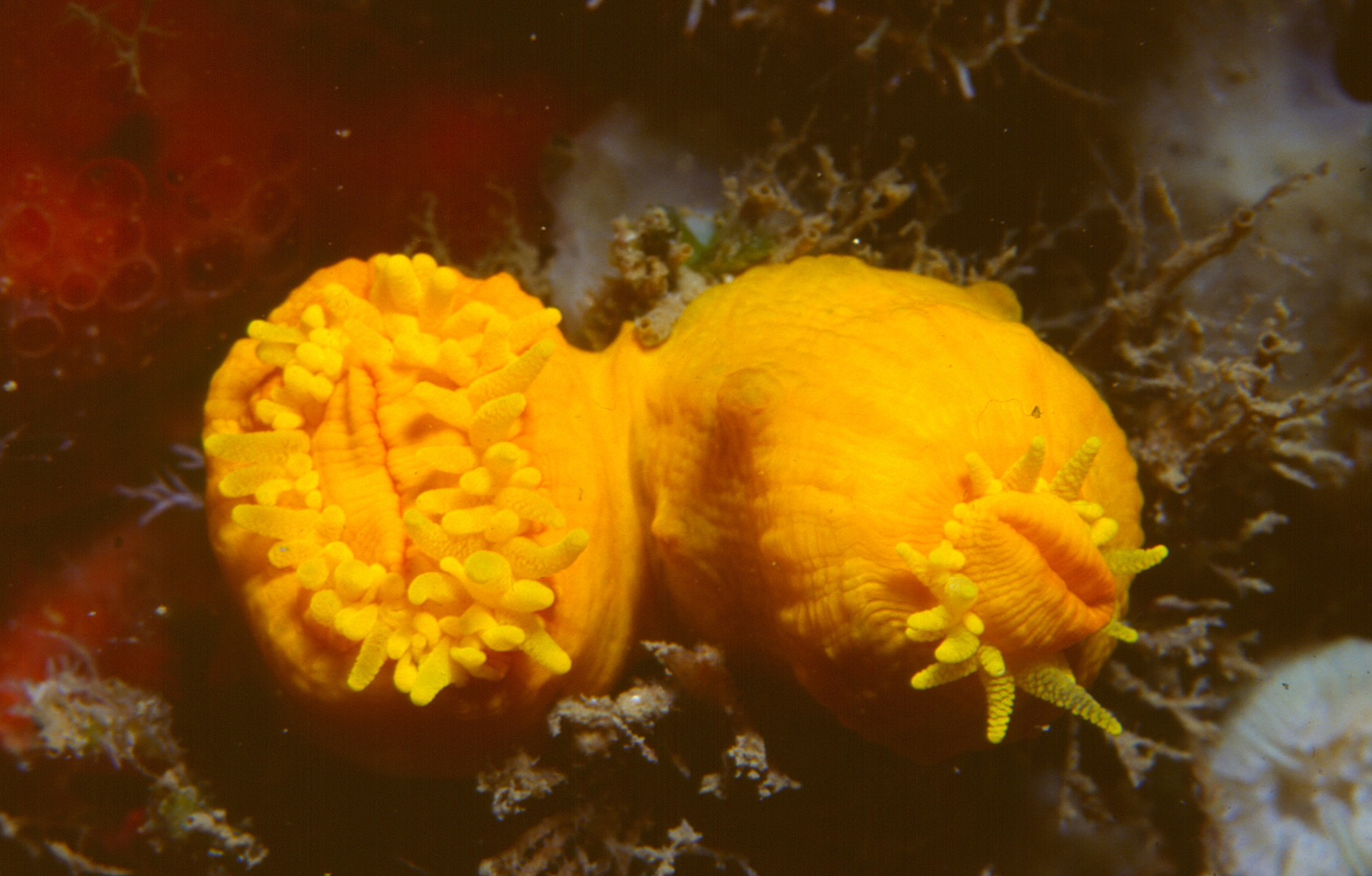 Leptosammia pruvoti (de Lacaze-Duthiers, 1897) - Banyuls-sur-Mer : 08/83